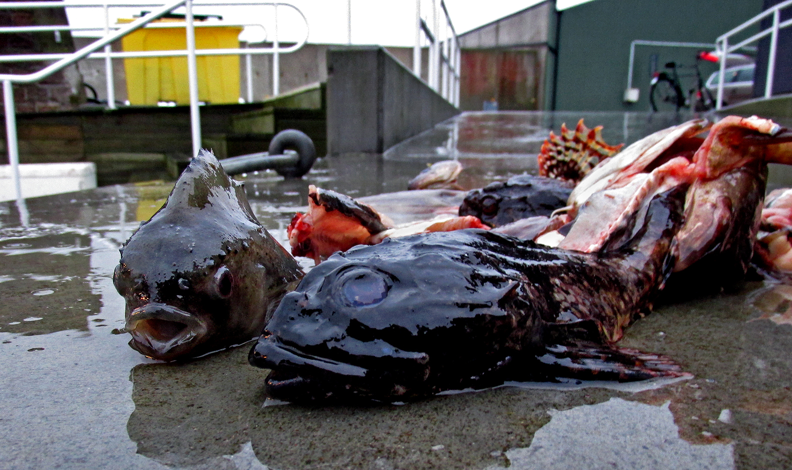 Diverse "skräpfisk" fisken tv är en Sjurygg. Ystads småbåtshamn 12 jan 2016.